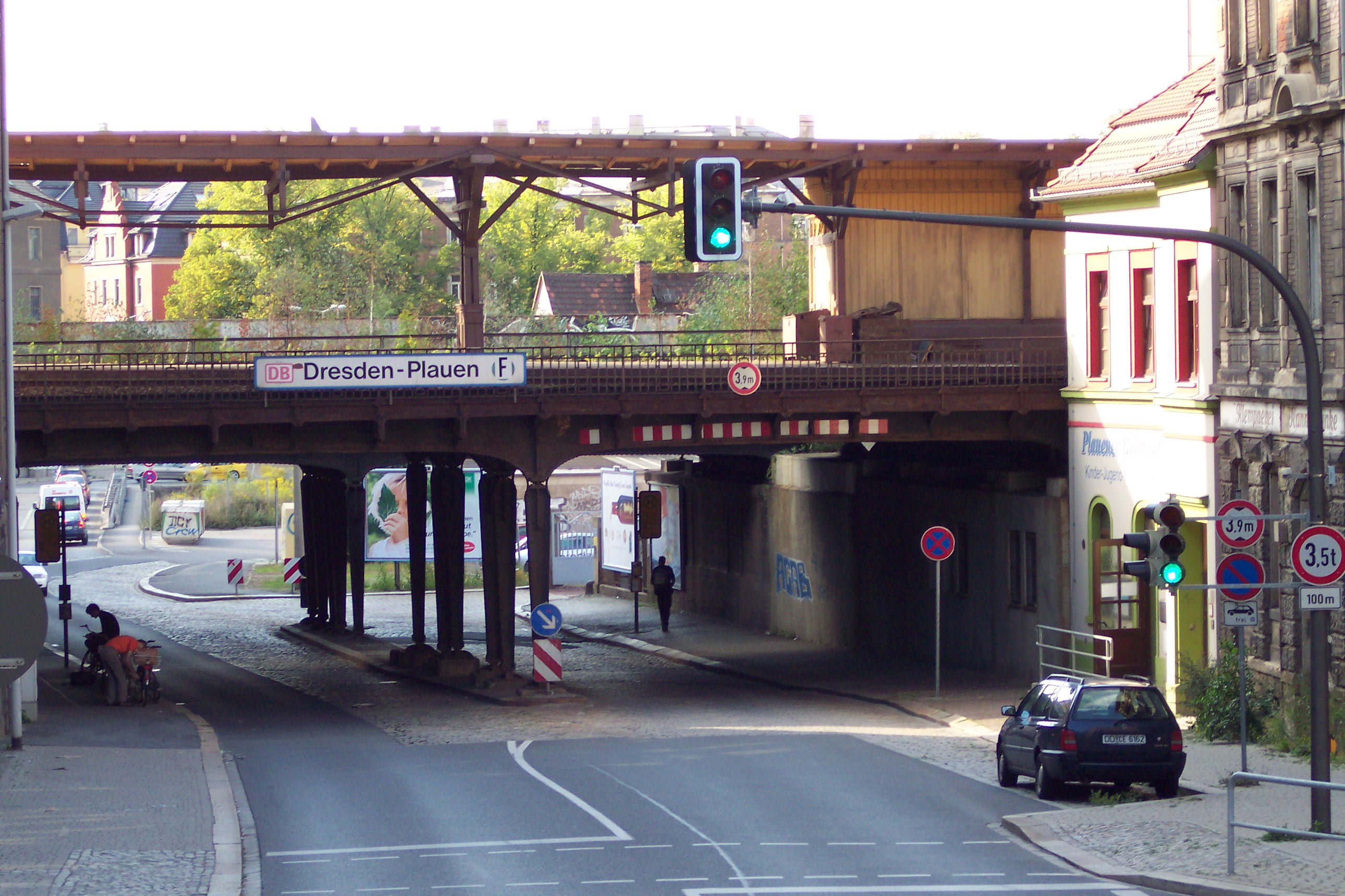 S-Bahn-Haltepunkt Dresden-Plauen, mit Behelfsbrücke im Hintergrund, vor Beginn der Arbeiten an der neuen Weißeritz-Brücke